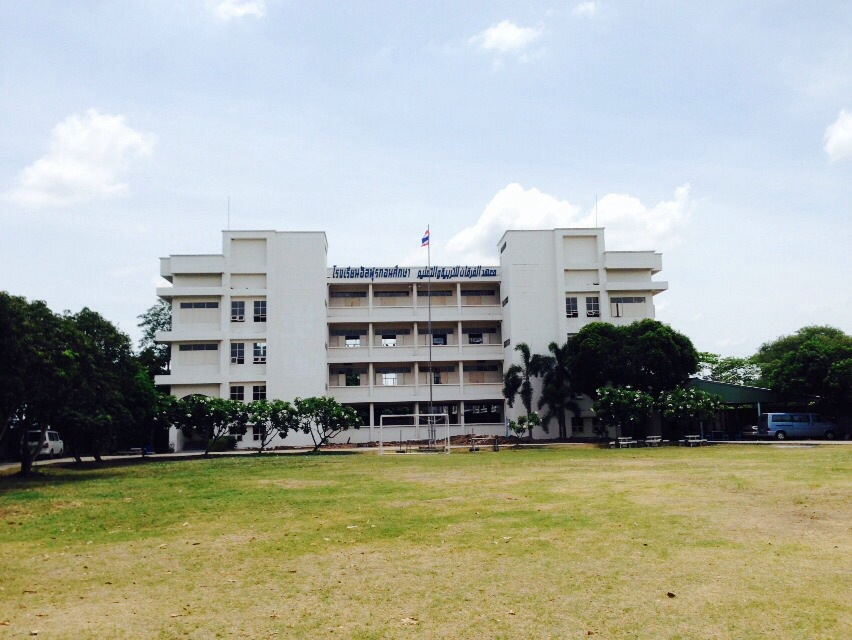 مبنى معهد الفرقان للتربية والتعليم